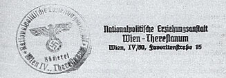 Bibliotheksstempel der Nationalpolitischen Erziehungsanstalt. (aus den Beständen der Bibliotheca Theresiana)